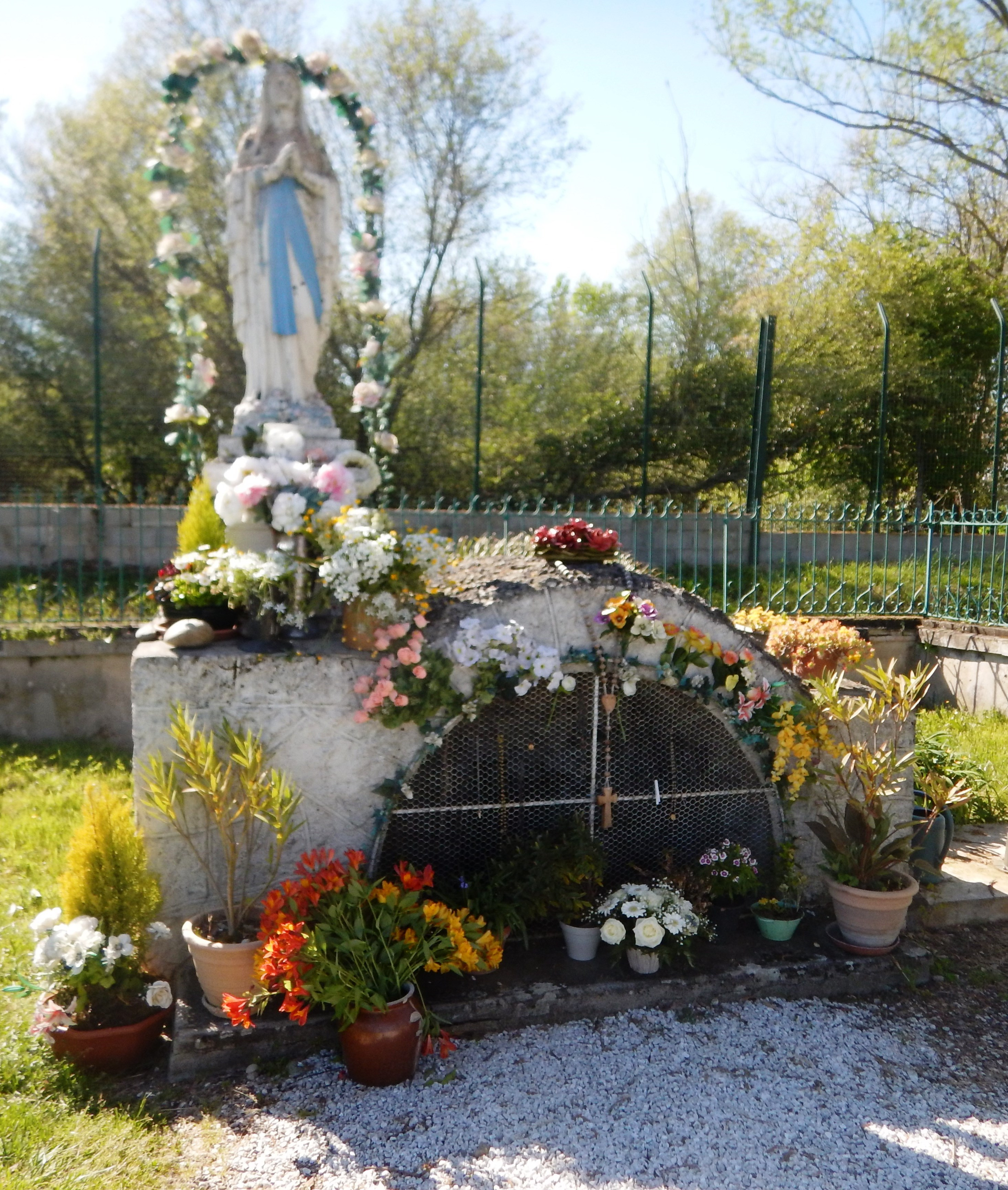 Source